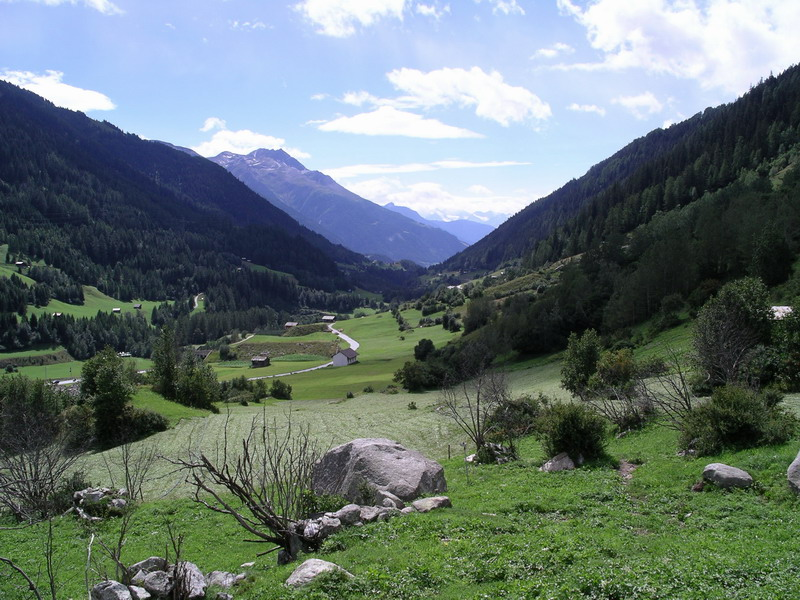 Aussicht oberhalb von Niederwald, Kantons Wallis, Schweiz